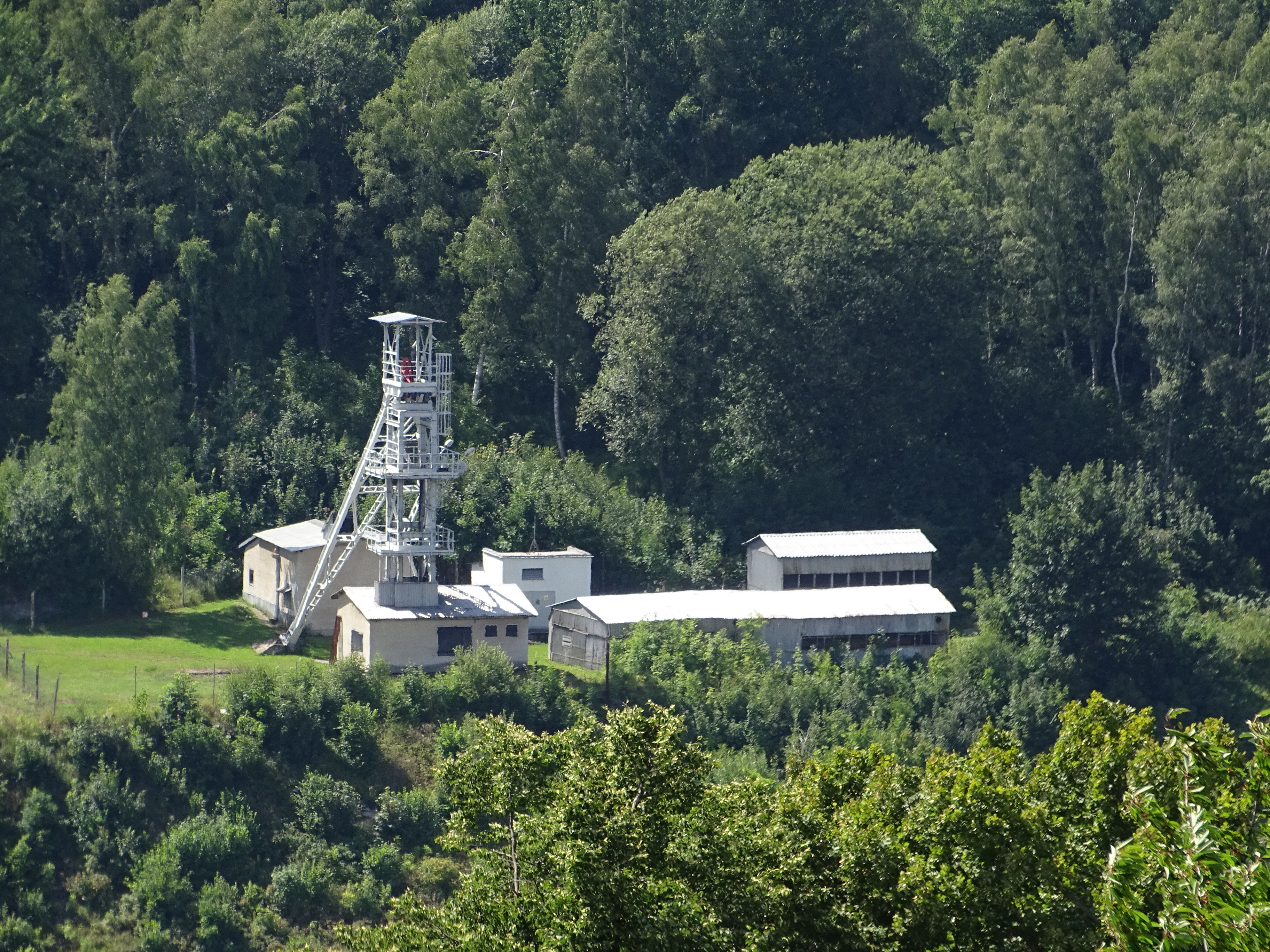 Důl Josef. Tato fotografie byla pořízena z vyhlídkového vrcholu Klobouk nad Jáchymovem, ke kterému patří výše uvedené souřadnice.